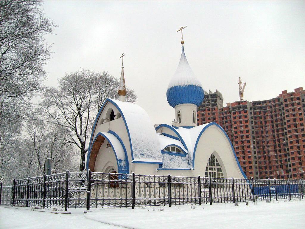 Церковь святого праведного Иоанна Кронштадского, Санкт-Петербург, пр. Стачек